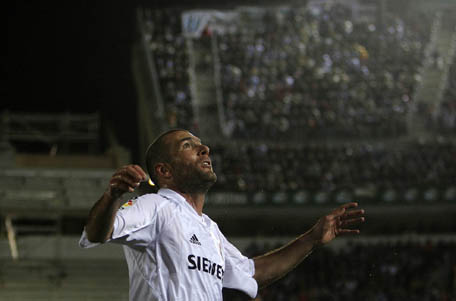 Zinedine Zidane, 2005